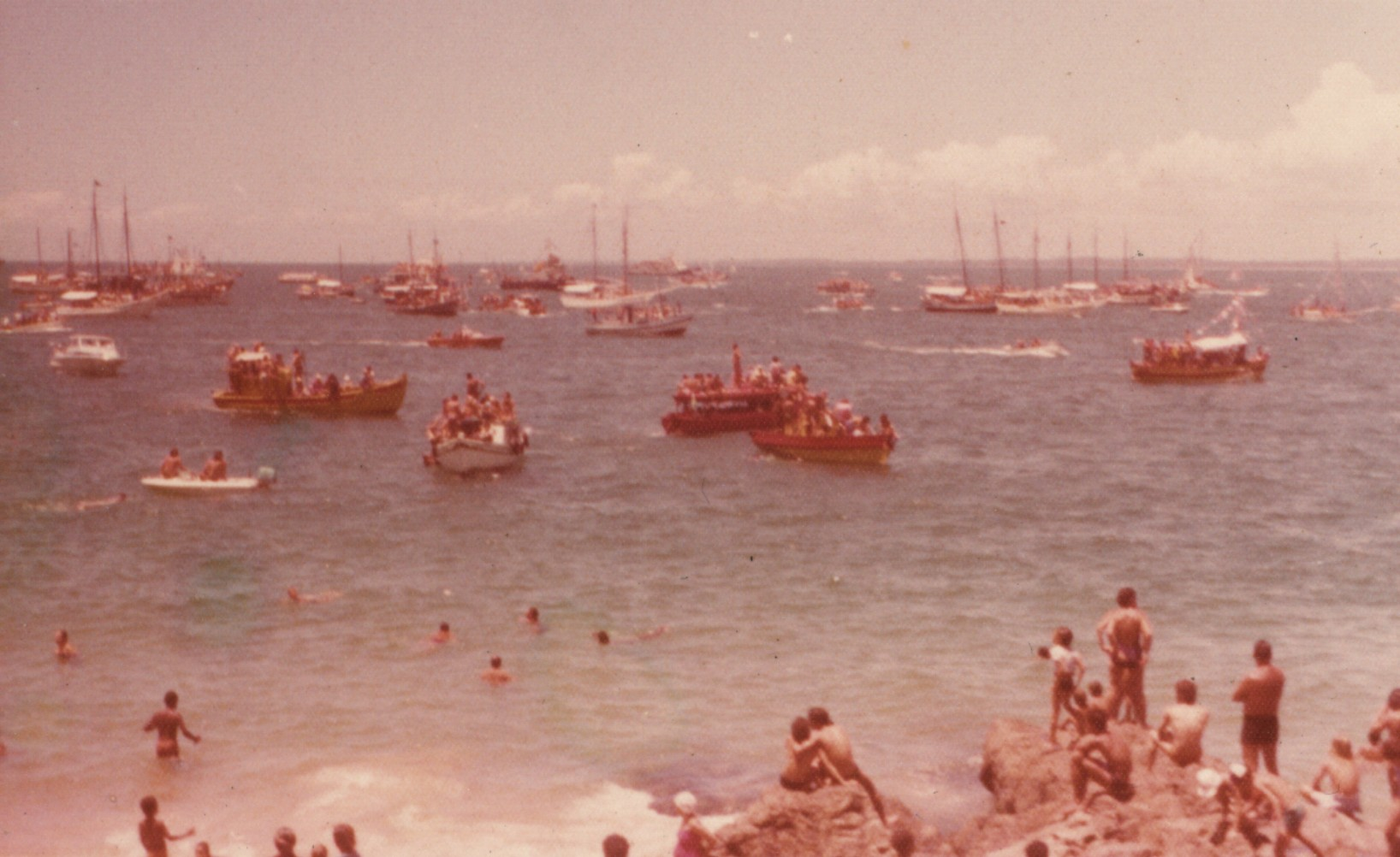 Praia do Porto da Barra (Salvador - Bahia), desfile de barcos